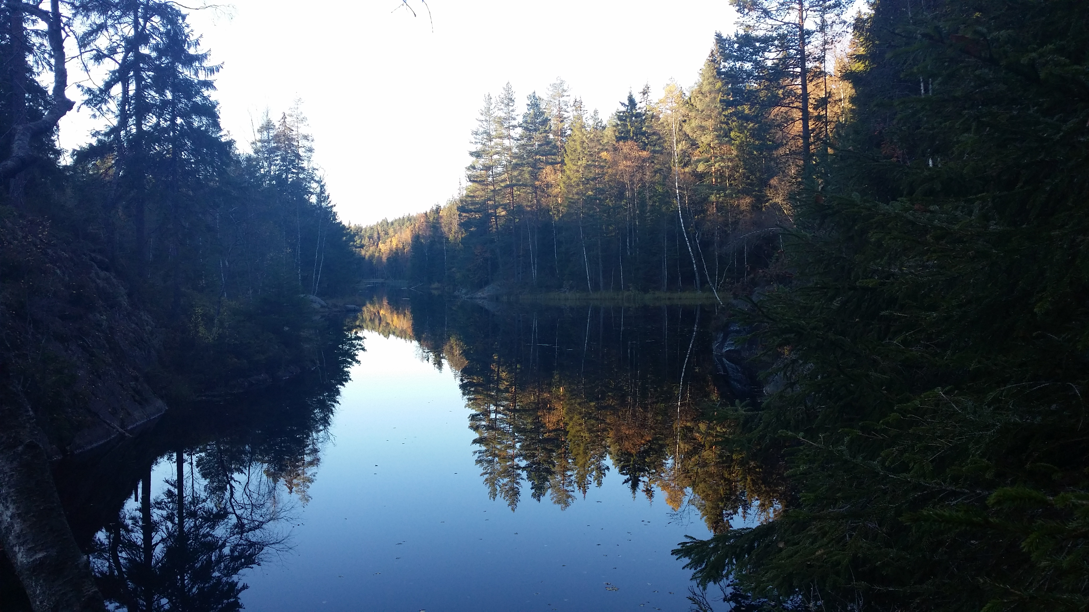 Nodligste ende av Svartoren, sett nordfra.